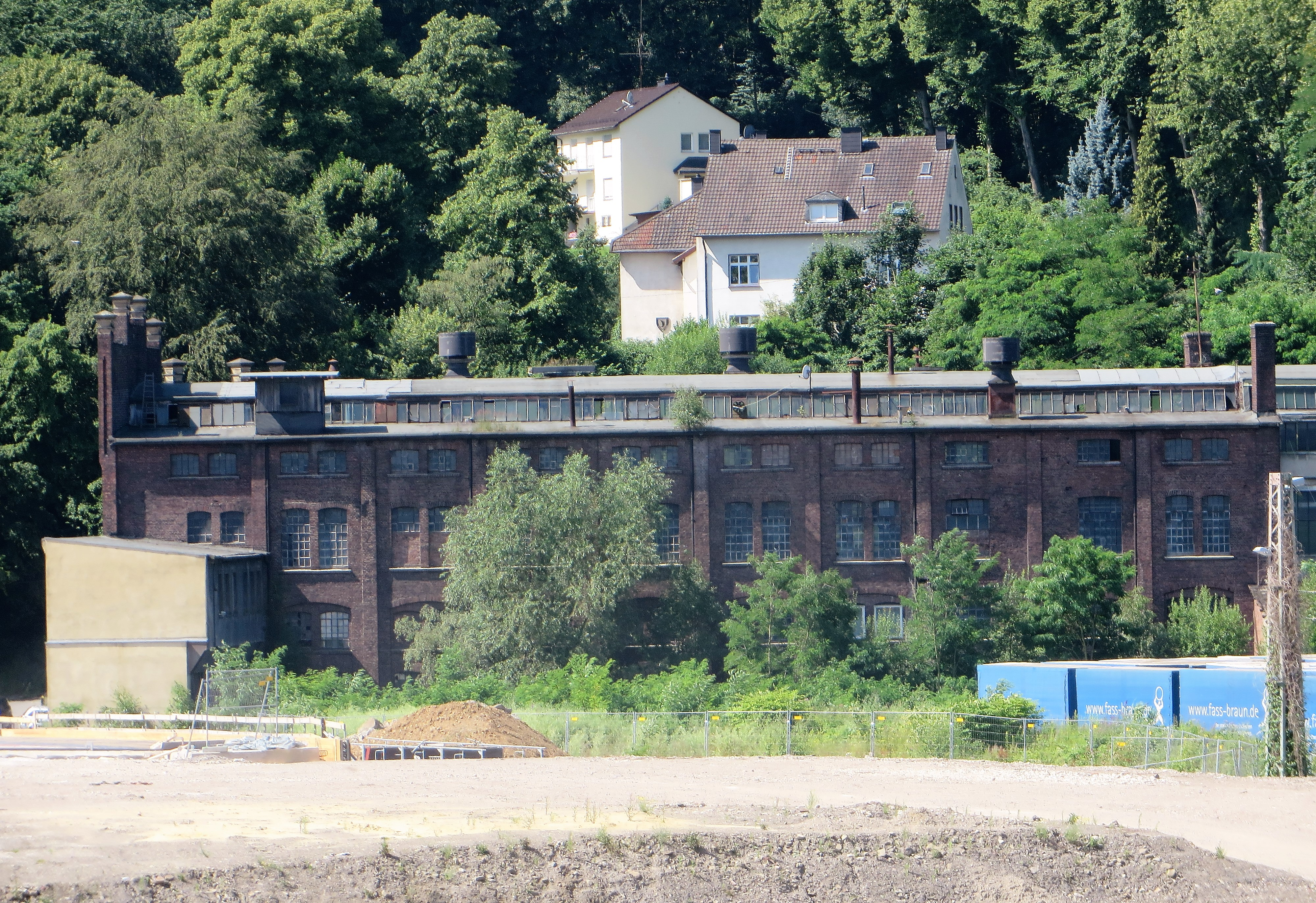 Denkmalgeschütztes Fabrikgebäude in Hagen, Plessenstraße 20, an der Ennepe gelegen. Ehemalige Schraubenfabrik und Gesenkschmiede Funcke & Hueck (gegründet 1844), im Jahre 1970 an die Firma Bauer & Schaurte (Neuss) verkauft und in den 1990er Jahren stillgelegt. This is a photograph of an architectural monument.